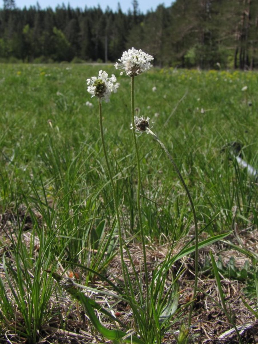 Srebrni trpotec v Devinu nad Vipavo.